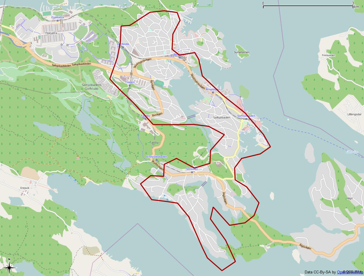 Tätorten Saltsjöbadens gränser 1990 enligt Atlas över rikets indelningar 1992.